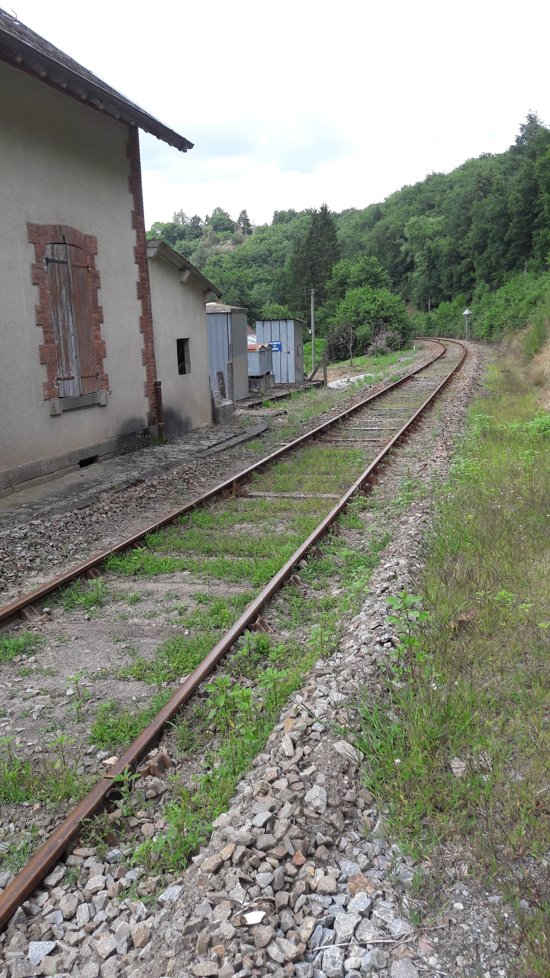 dans la vallée de la Creuse près de la D18